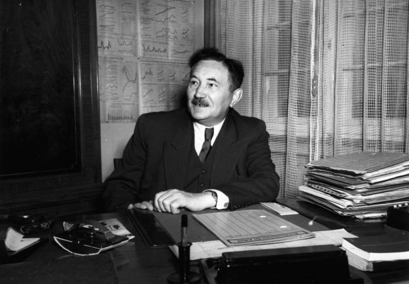 Anton Storch Bundesminister für Arbeit und Sozialordnung, 1949-1957